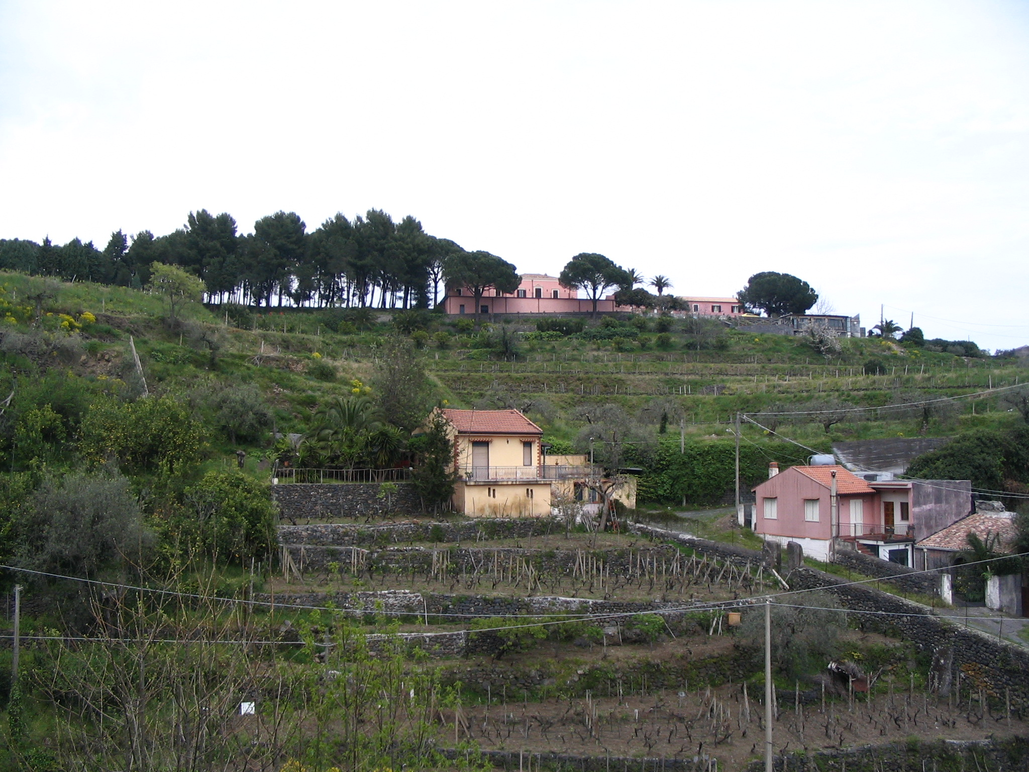 Via Zafferana - hameau de San Michele Santa Venerina- en direction de Santa Vanerina